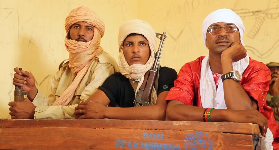 Combattants de la CMA lors d'une réunion avec des représentants de l'ONU à Ber, au Mali, en janvier 2017. 1